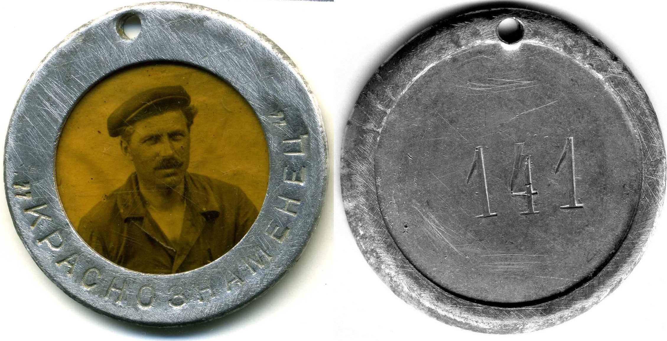 Жетон №141 работника завода Краснознаменец. 1930-е годы.